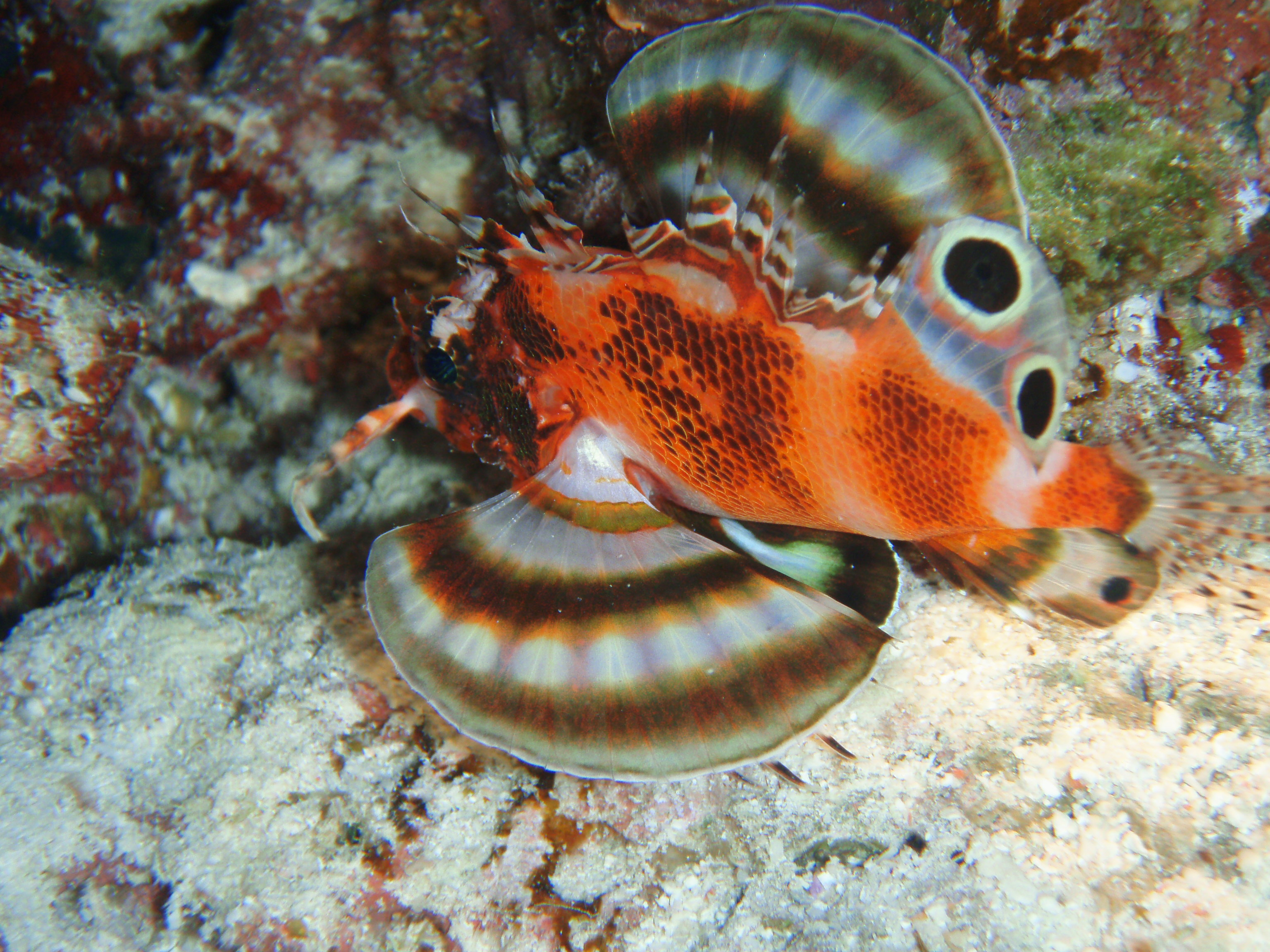 Scorpaenidae, Dendrochirus biocellatus, Pteroïs ocellé